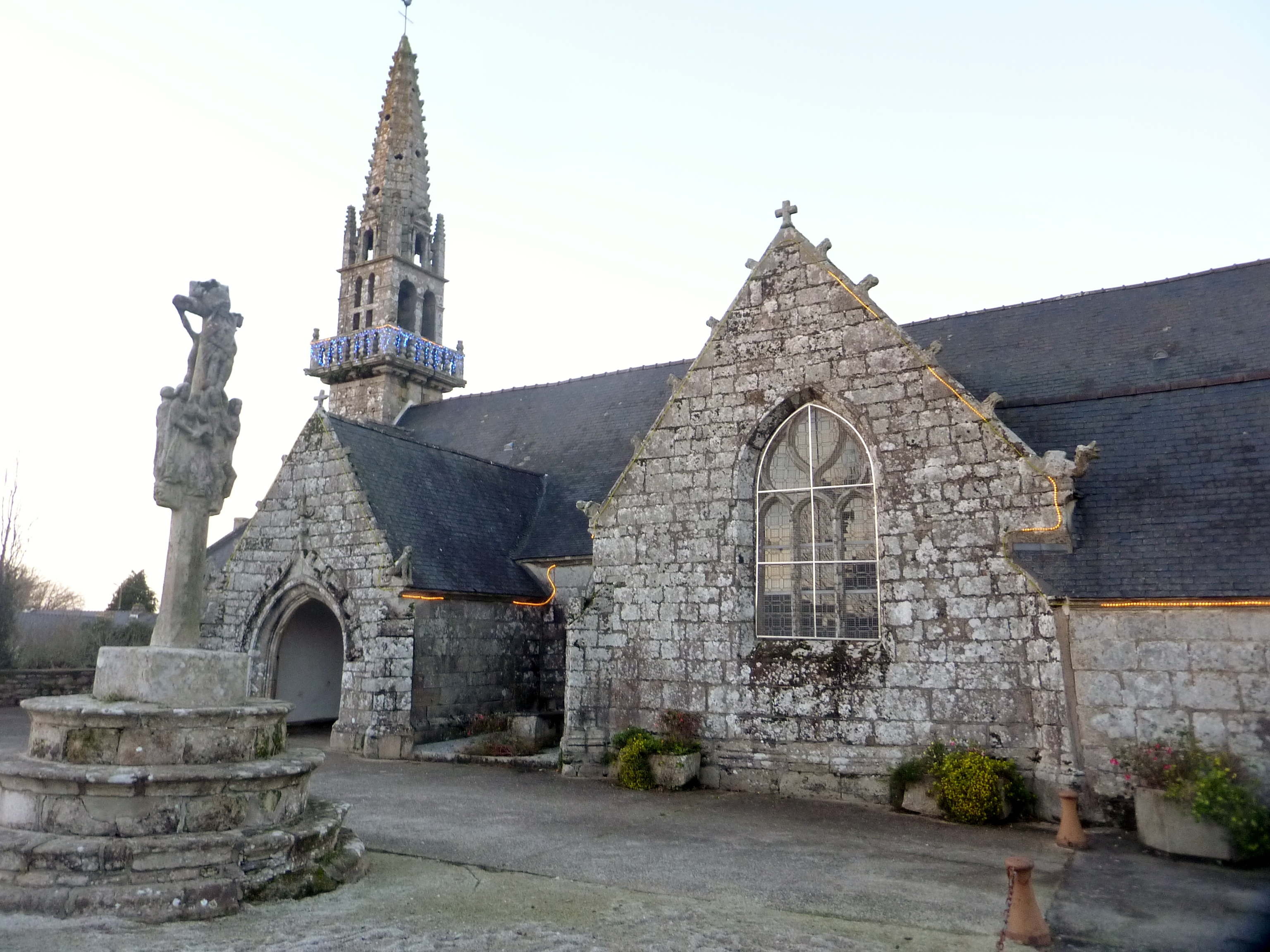 Leuhan : l'église paroissiale Saint-Théleau date du XVIe siècle (avec ses illuminations de Noël) et le calvaire construit en 1659 .